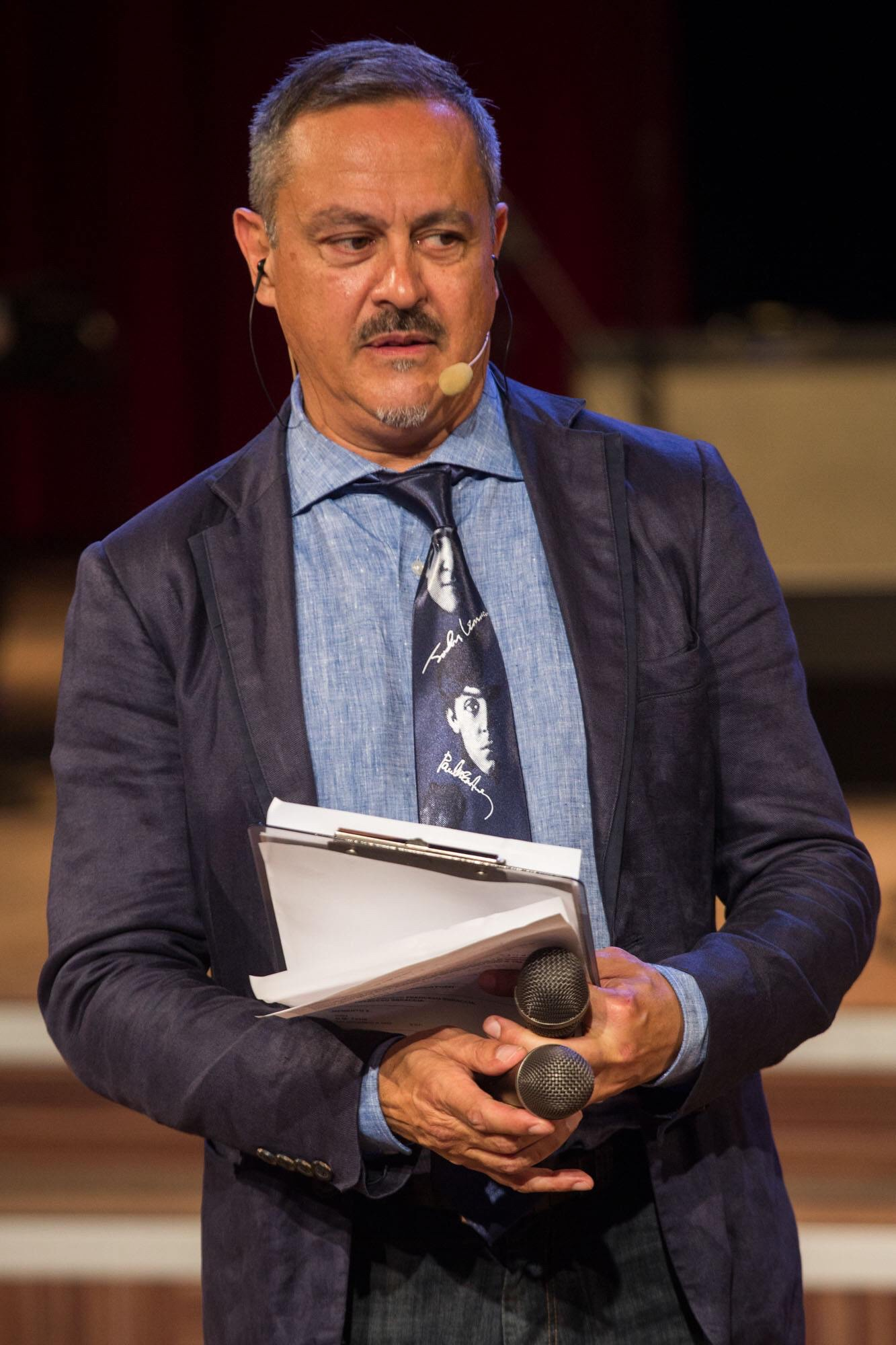 John Vignola